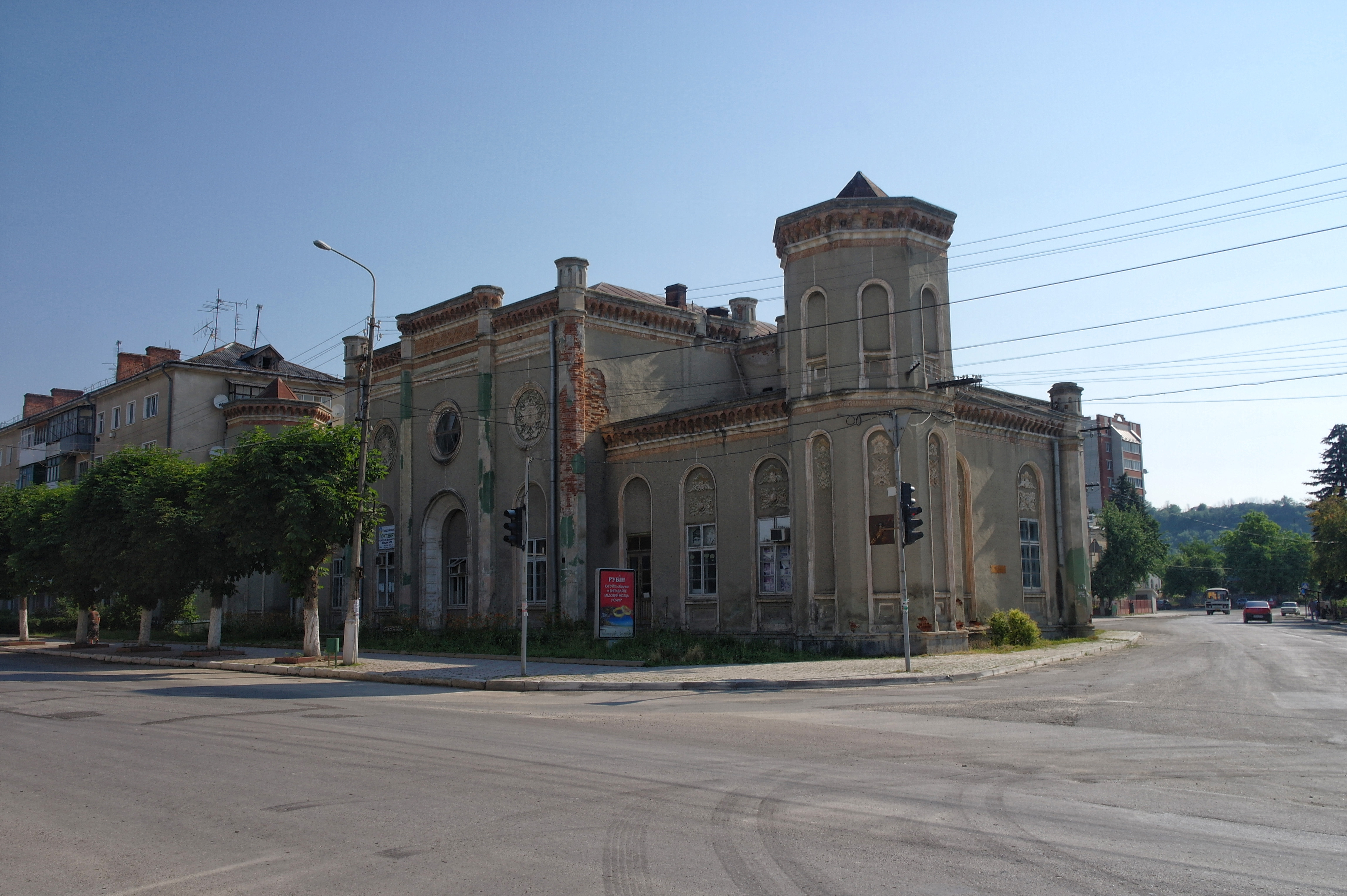 Чортків, Синагога